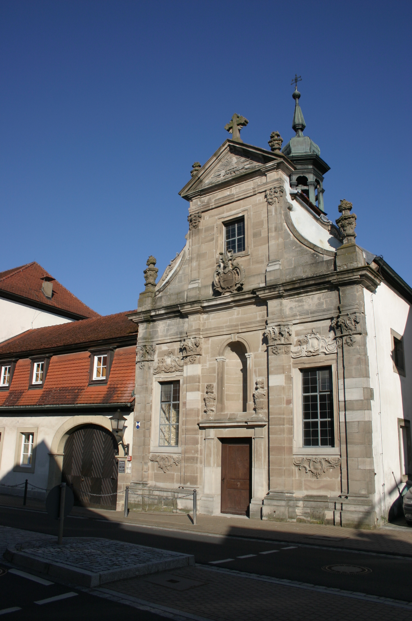 Schlosskirche Gleisenau von der Straße aus gesehen